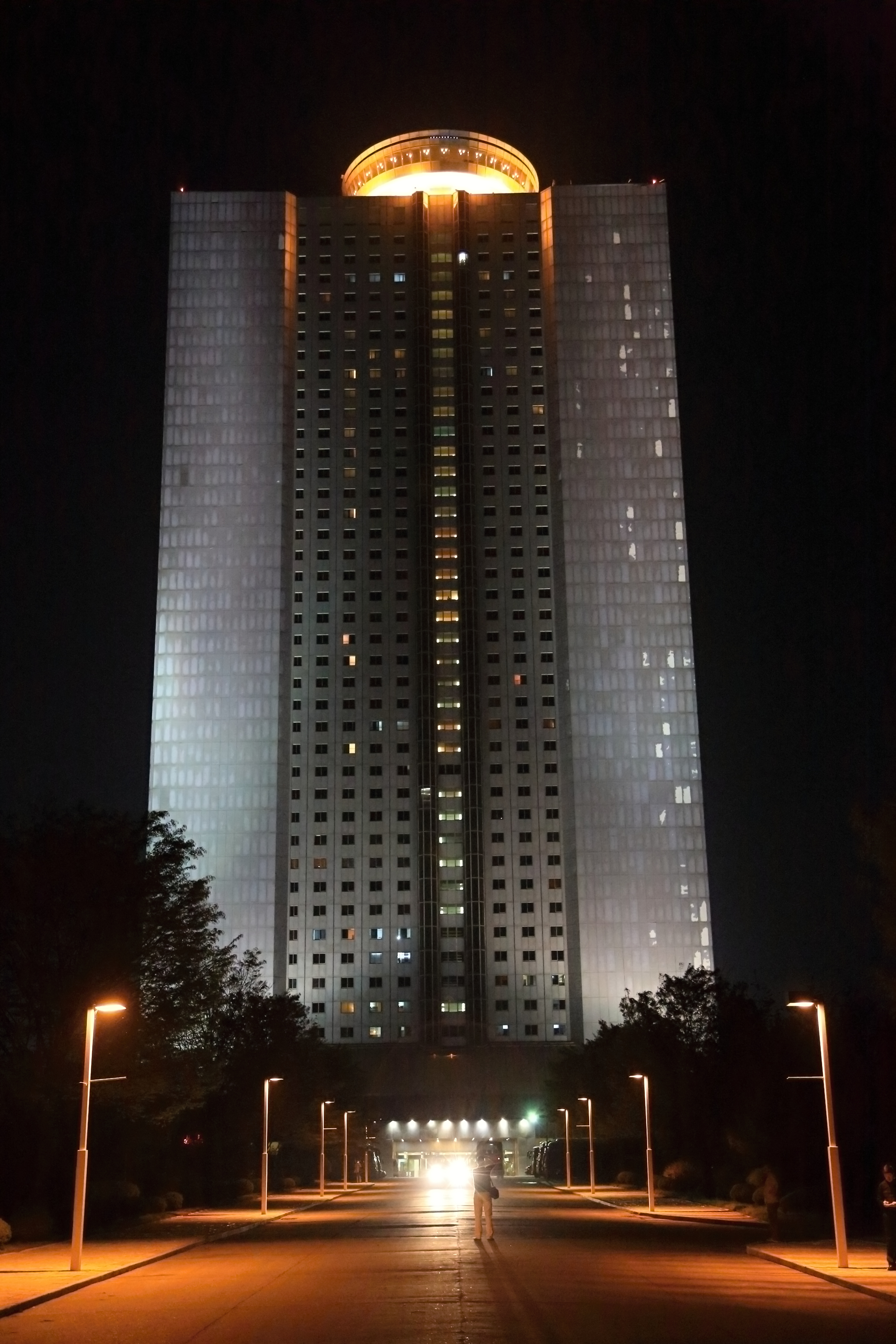 47patrový hotel Yanggakdo